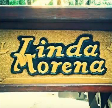 Marimba Mi Linda Morena - Bárcena, Villa Nueva.